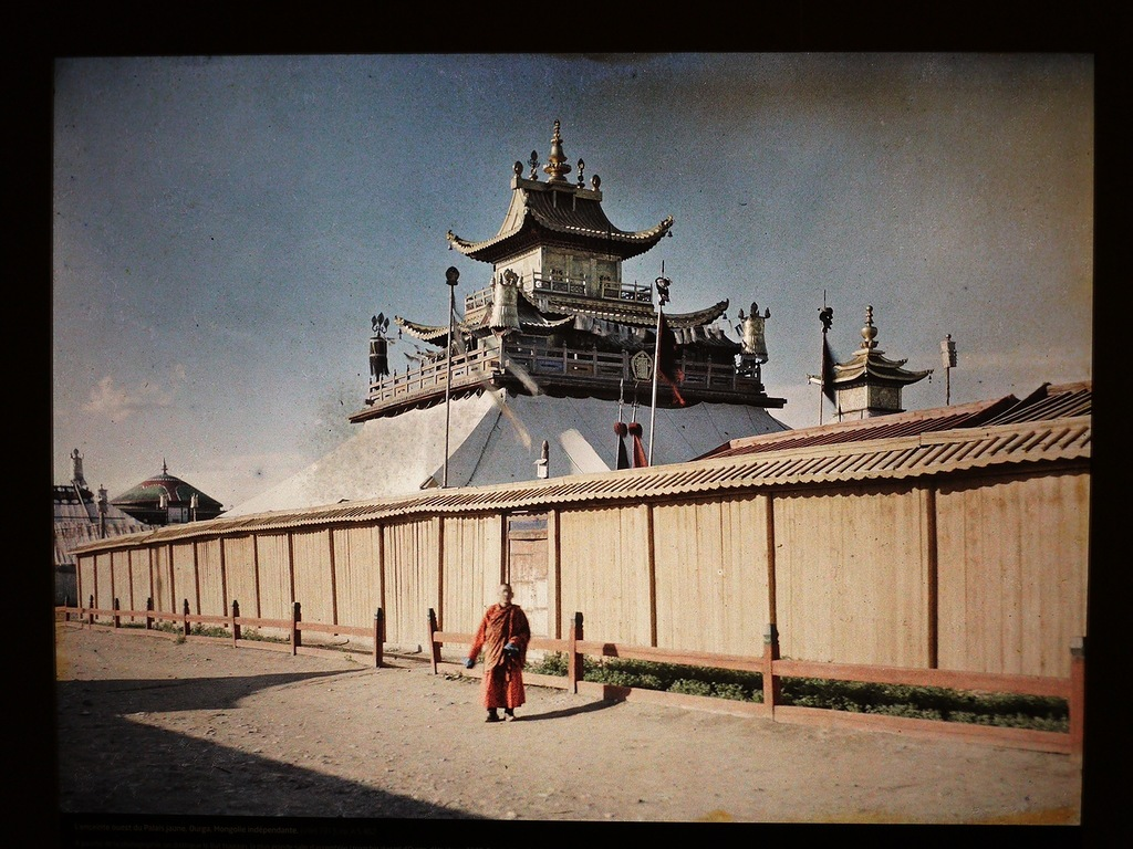 1913年，库伦的街道。